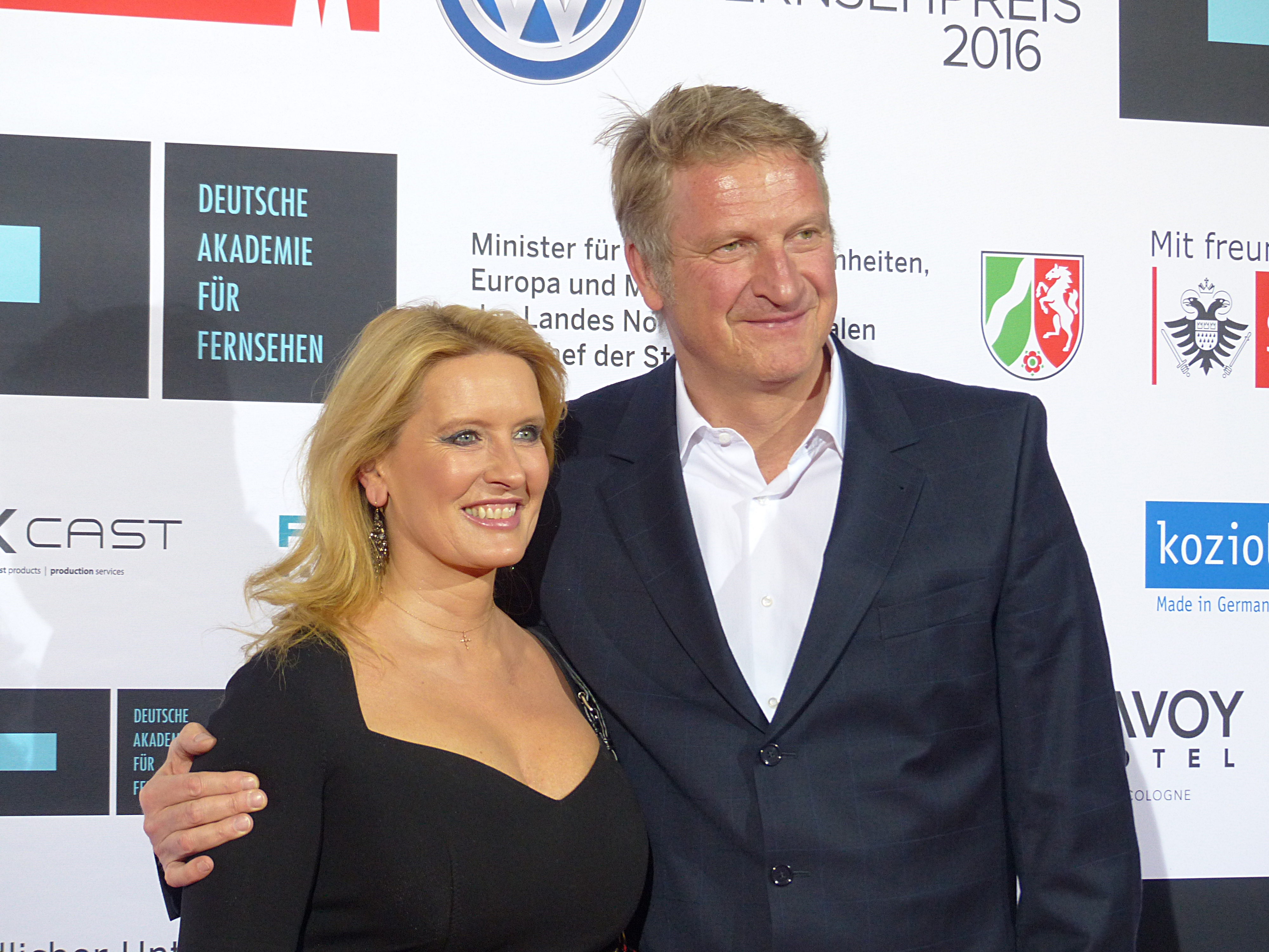 Claudia Kleinert und Michael Souvignier bei der Verleihung zur Auszeichnung 2015, durch die Deutsche Akademie für Fernsehen, im November 2015.